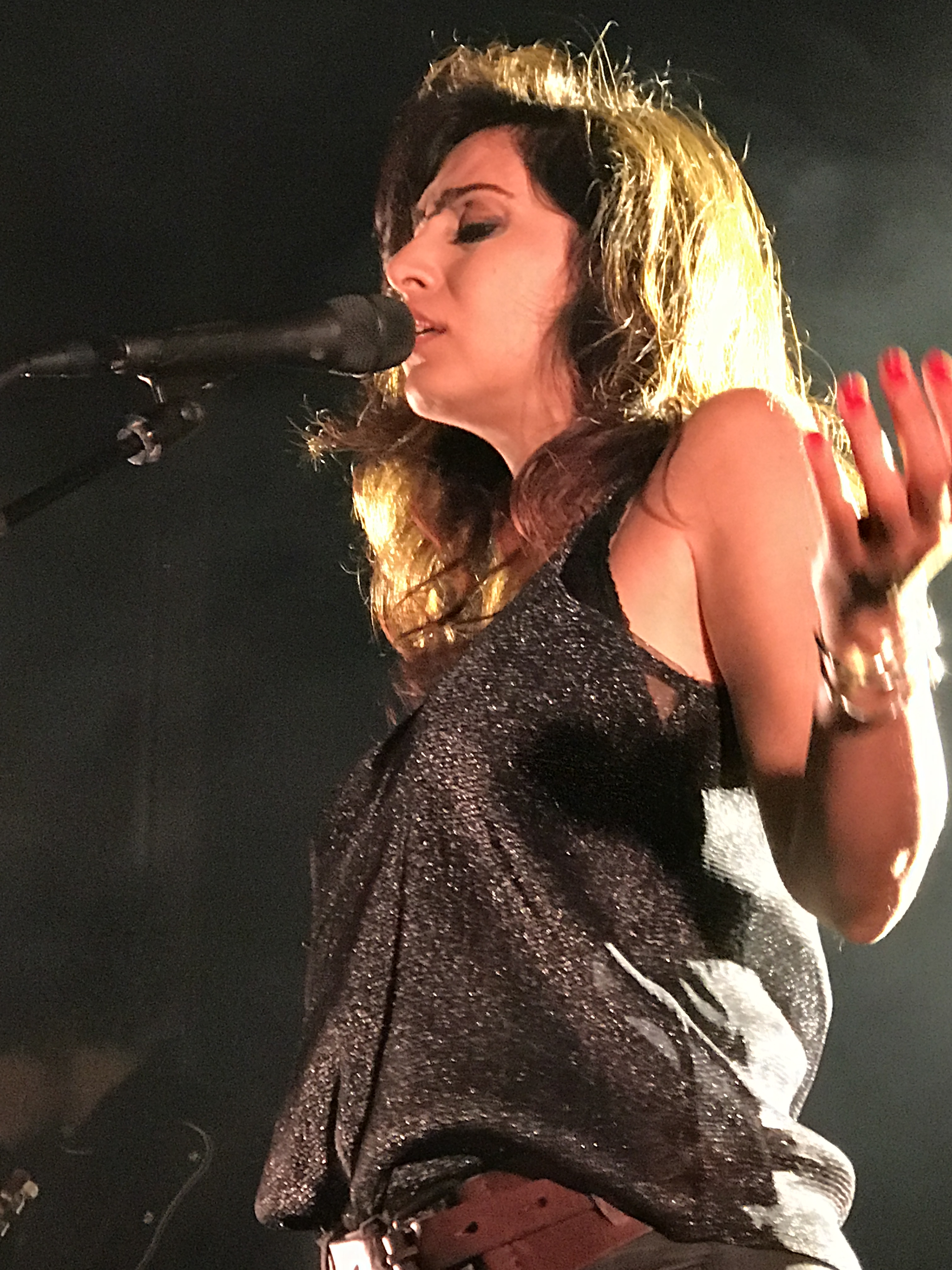 Yasmine Hamdan bei dem Konzert in der Berliner Columbiahalle